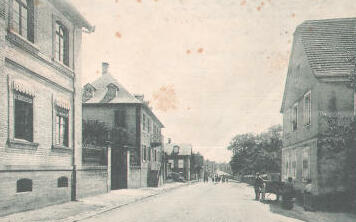 Ansichtskarte von Gundershoffen